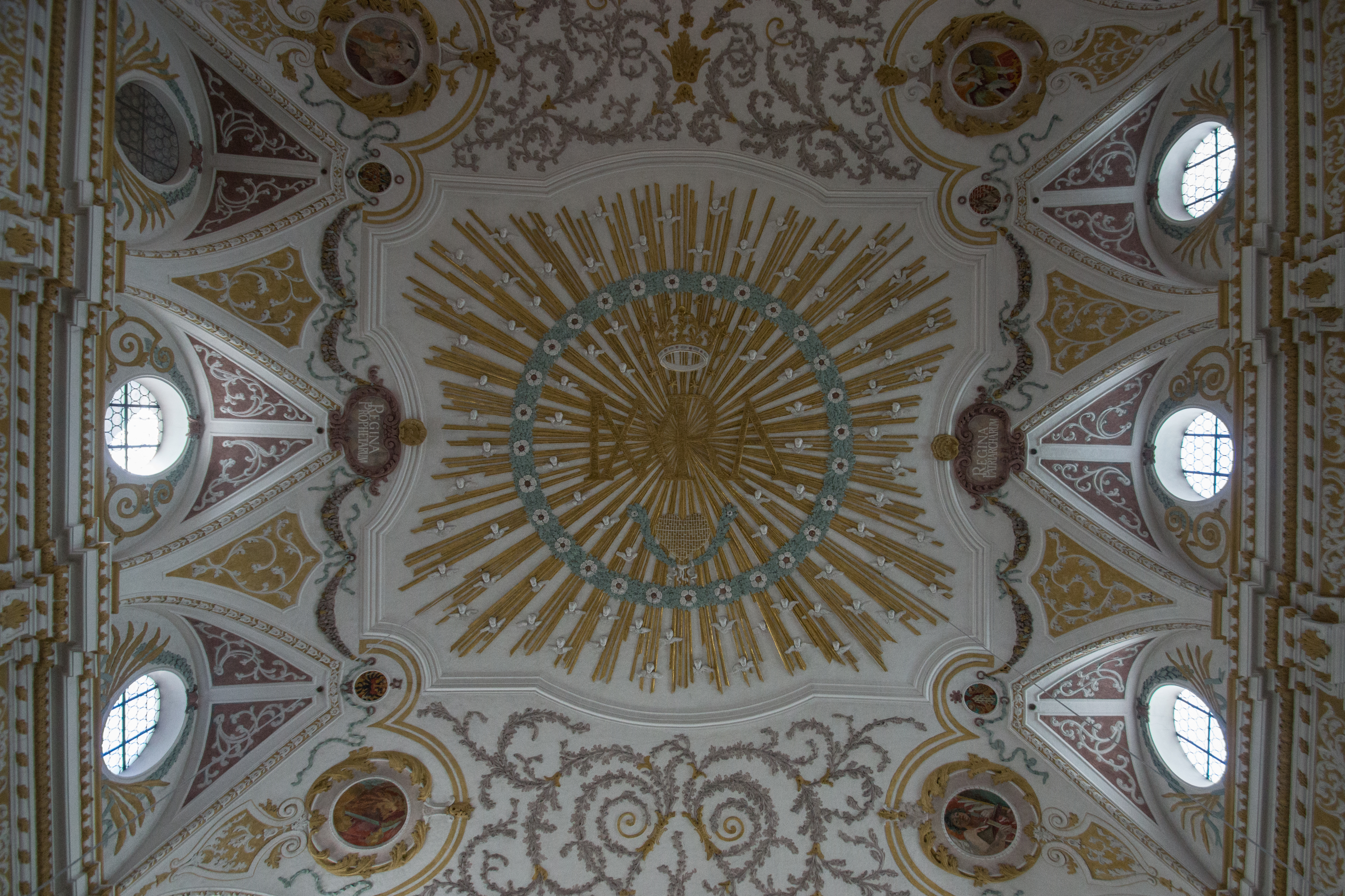 Bürgersaalkirche MunichThis is a photograph of an architectural monument.